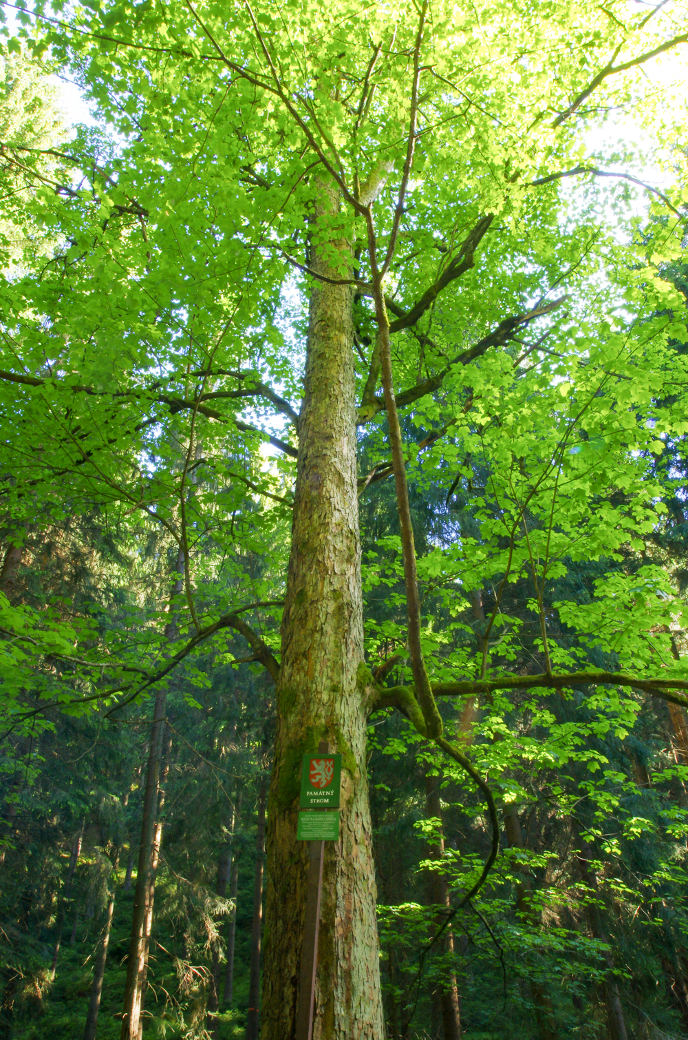 památný strom - Klen na konci světa, Krušné hory, okres Sokolov